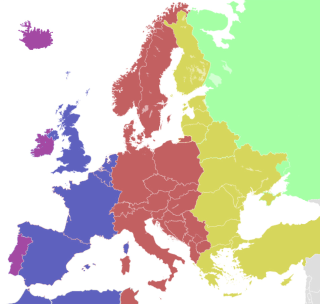 hypothetische Zeitzonen in Europa idealtypisch